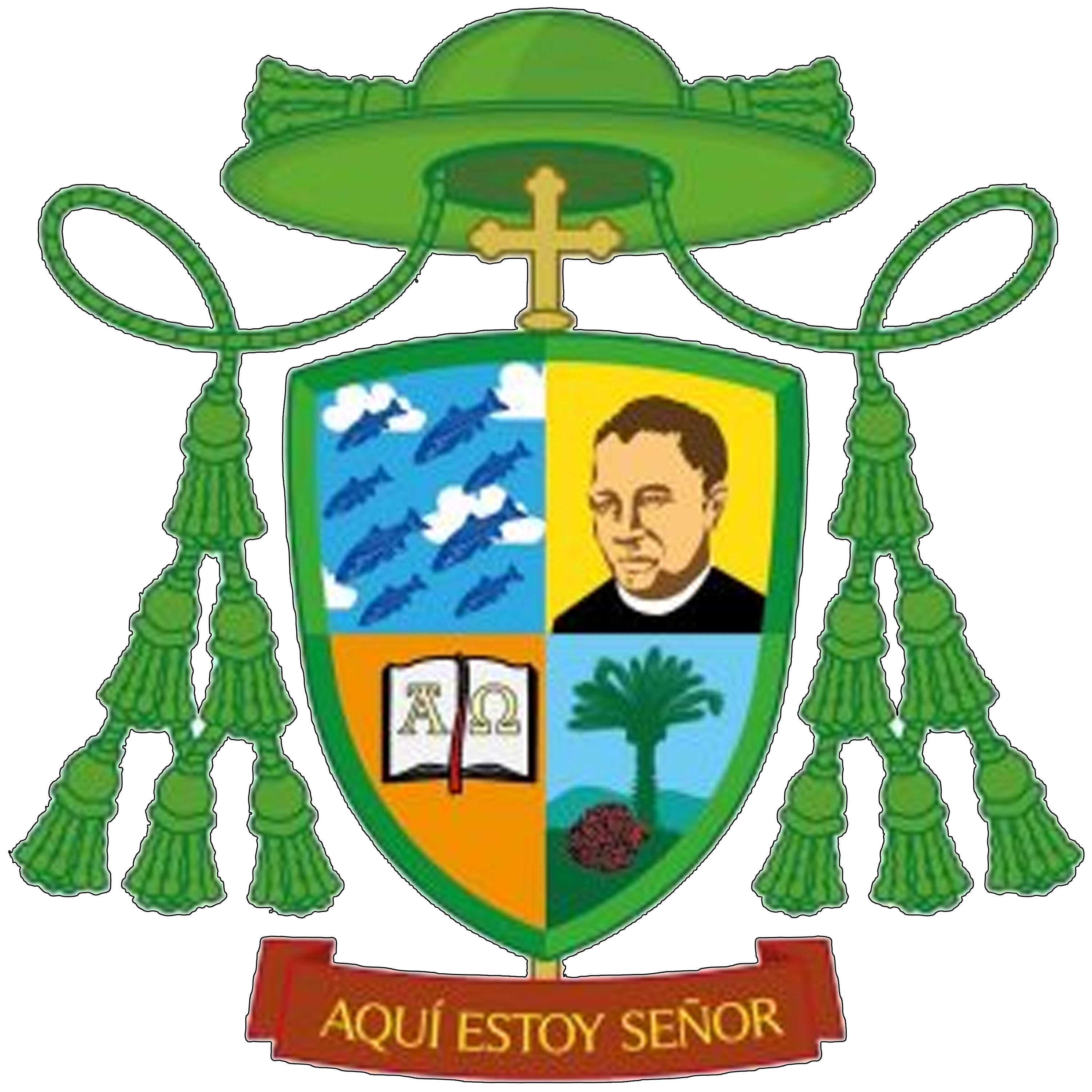 Escudo episcopal de Héctor David García Osorio obispo de Yoro